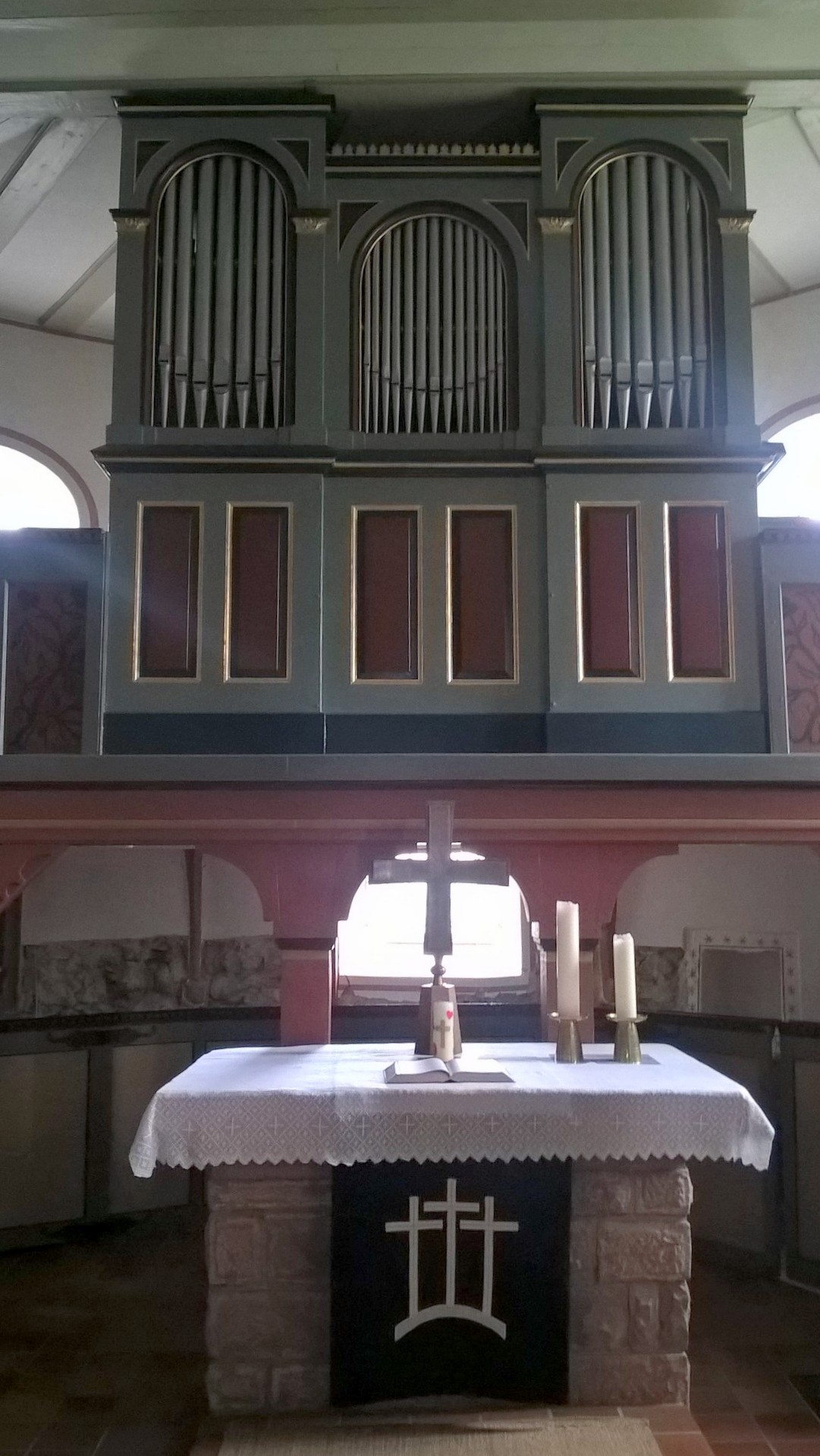 Evangelische Kirche Stangenrod, Grünberg, Landkreis Gießen, Hessen, Deutschland